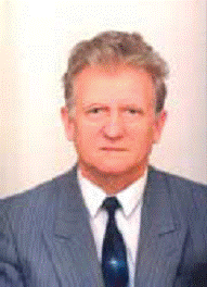 Раренко Іларій Михайлович.gif — академік АН вищої школи України